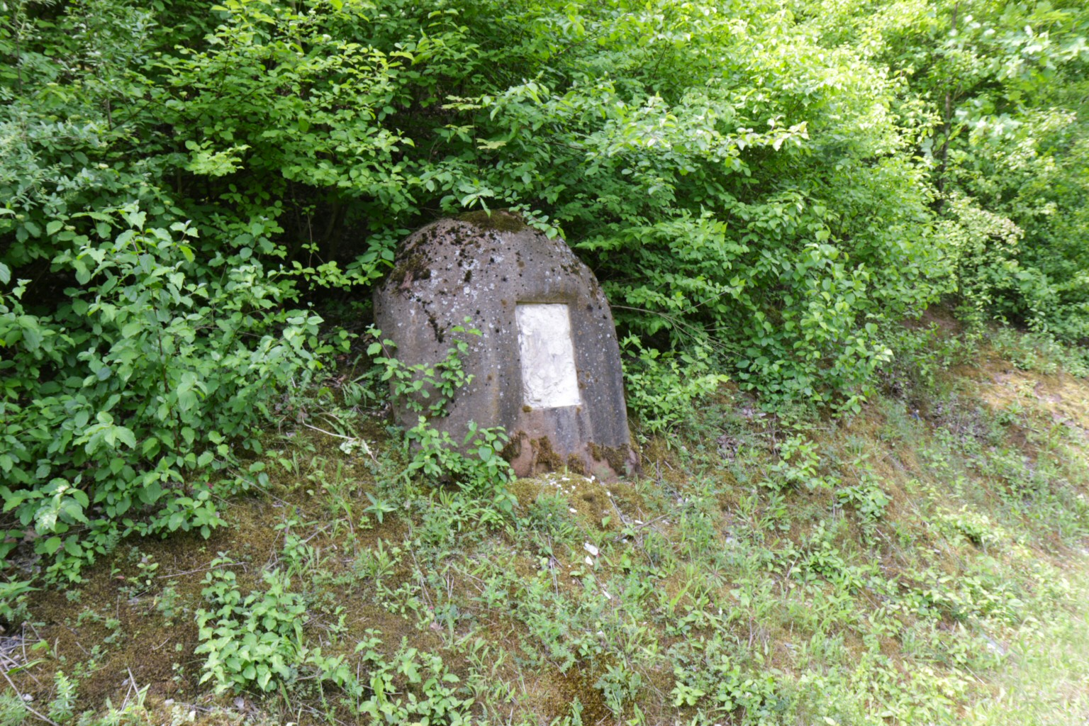 Gedenkstein am Streckenkilometer 50 der Schnellfahrstrecke Mannheim-Stuttgart